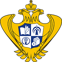 Федеральное агентство по печати и массовым коммуникациям РФ. Герб.